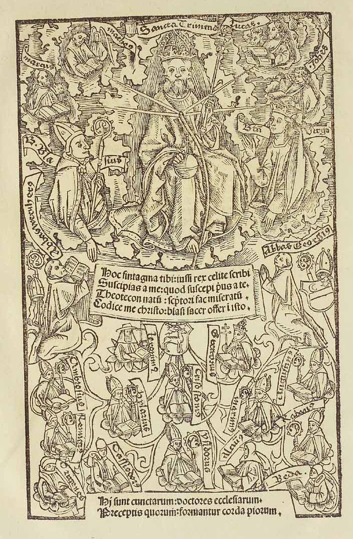 Werner von St. Blasien: Libri deflorationum. Basel 1494